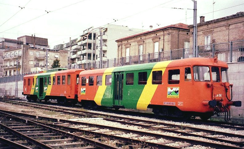 Rimorchi treno della valle nella vecchia stazione di Lanciano